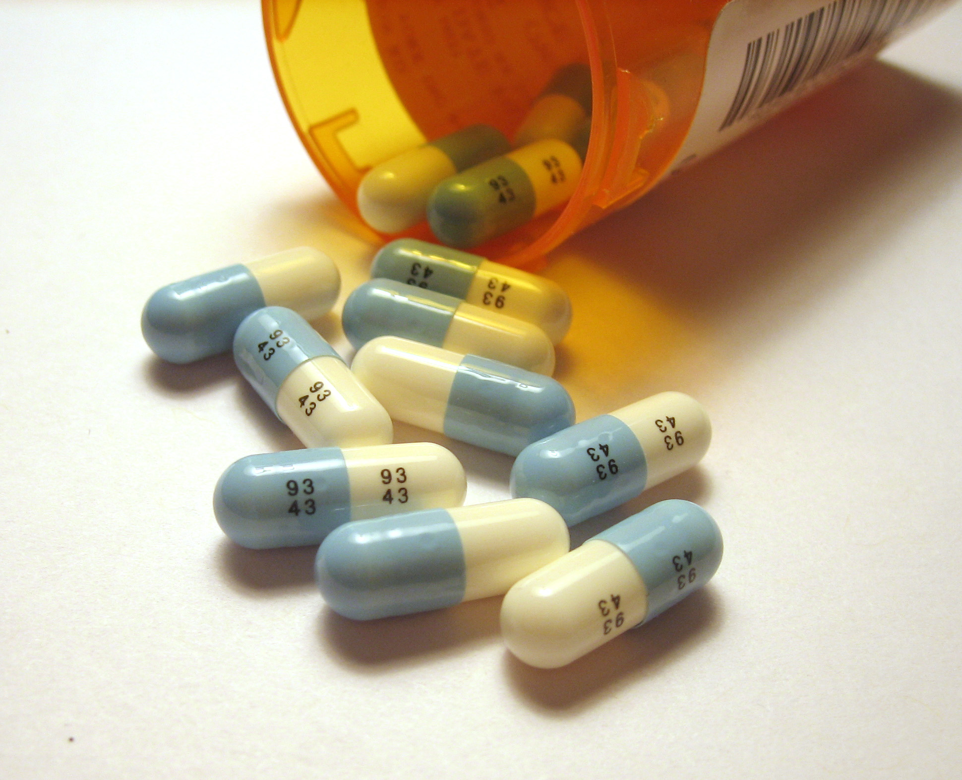 Fluoxetine HCl 20mg Capsules (Prozac)